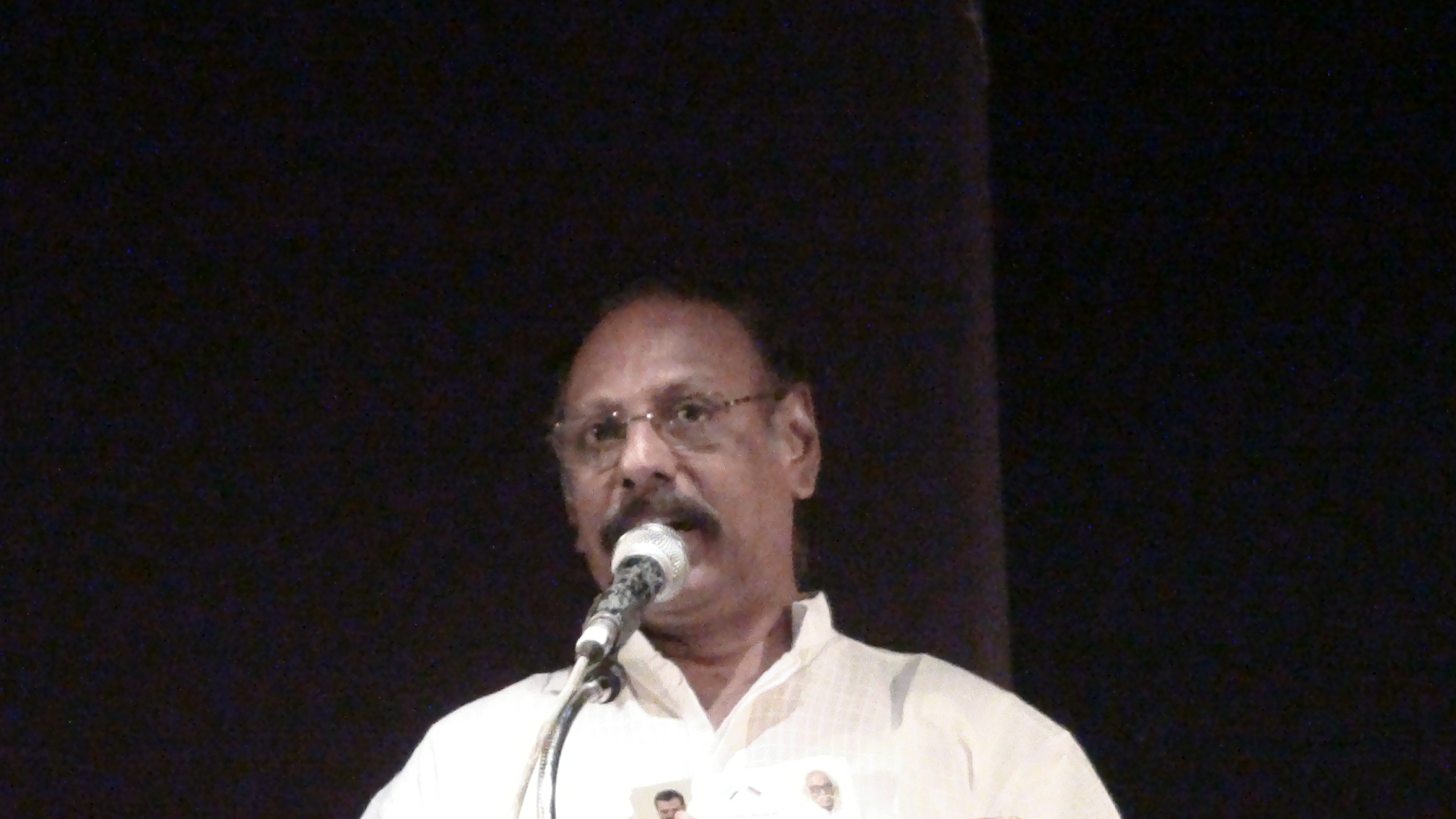 தினமணி நாளிதழின் தற்போதைய ஆசிரியர் கே. வைத்தியநாதன்